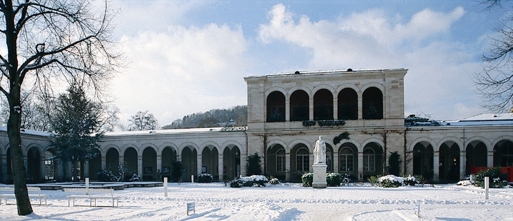 Blick auf den 1835 von Friedrich von Gärtner gebauten Arkadenbau im winterlichen Bad Kissingen (Bayern)